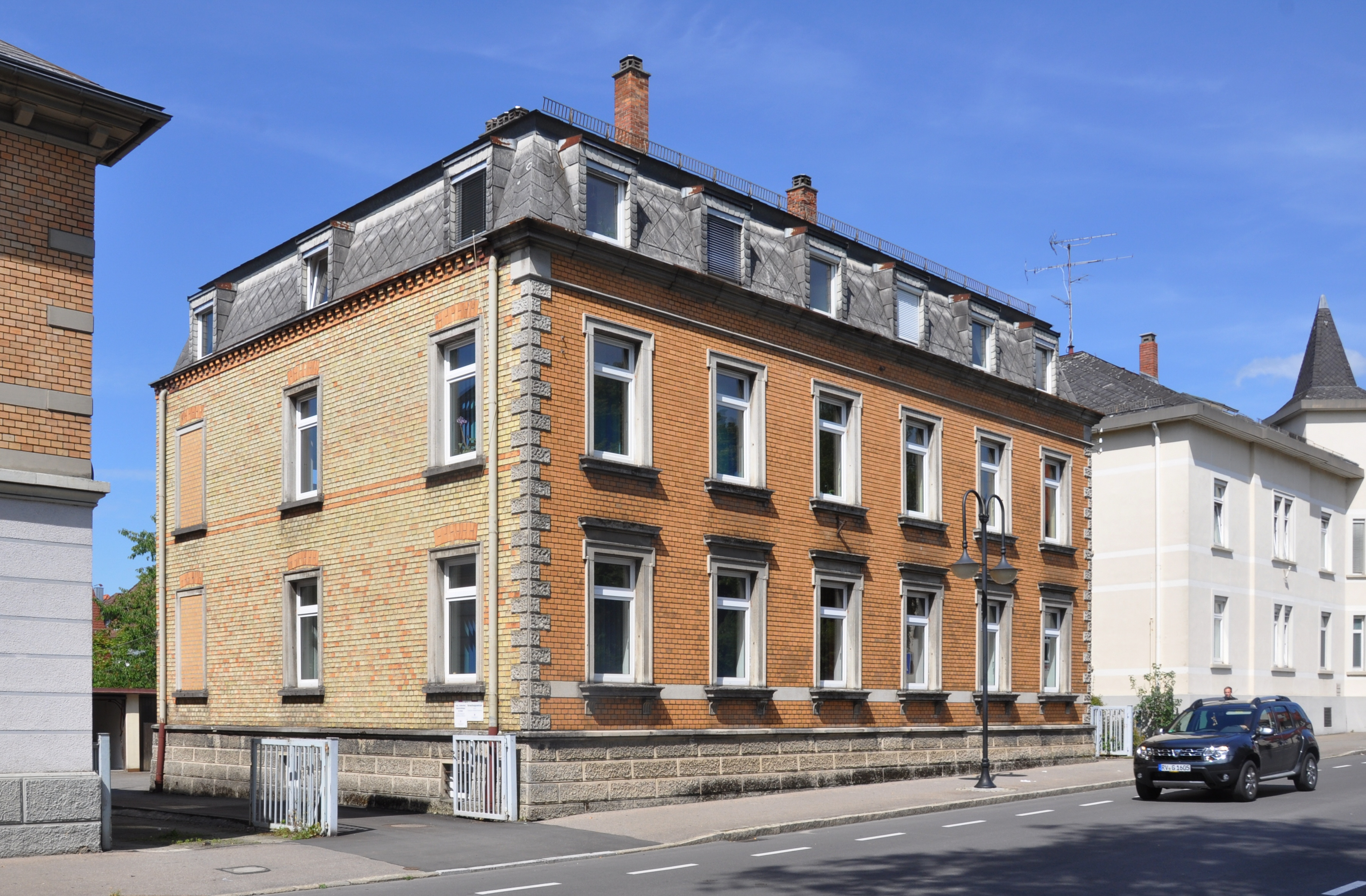 Weingarten (Württemberg), Abt-Hyller-Straße 14, Verwaltungszentrum Bereich Evangelischer Kirchenbezirk Ravensburg